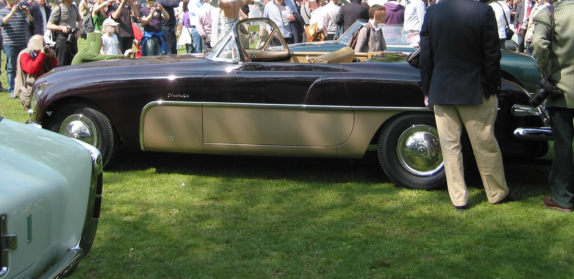 Cisitalia 808 XF 1952